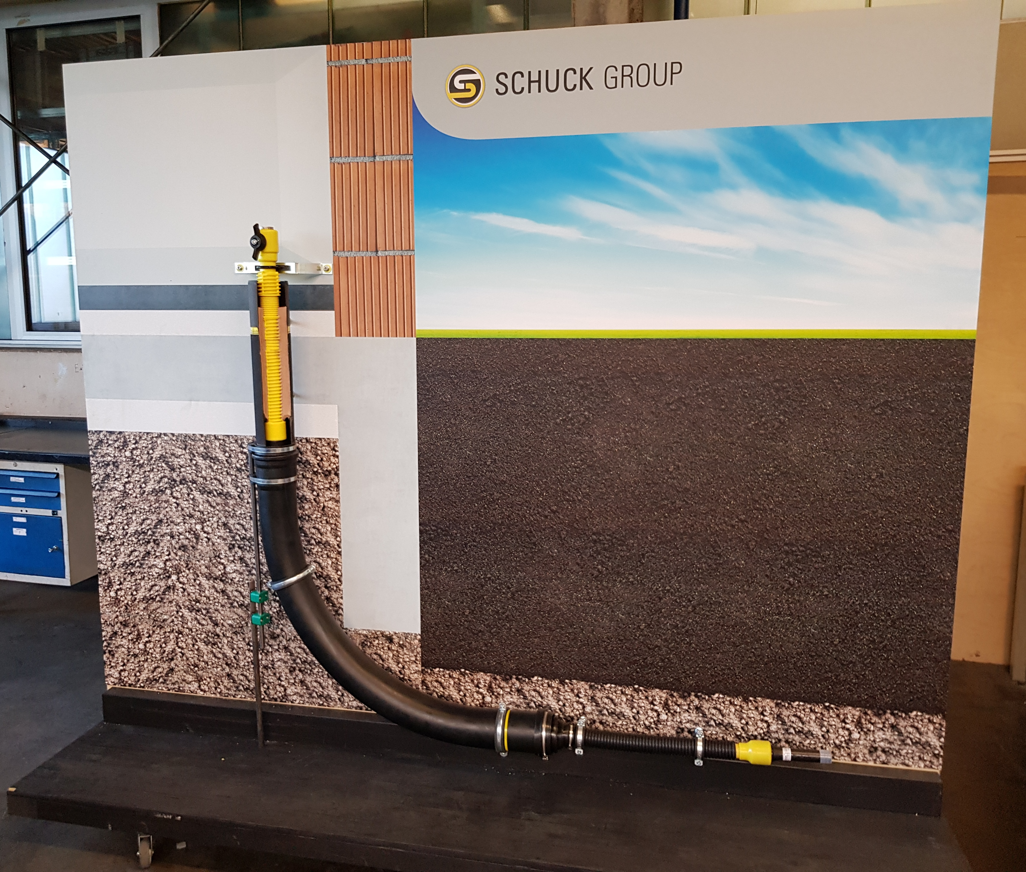 Schnittmodel einer DVGW-zertifizierten Gashauseinführung Fabrikat Schuck für Gebäude ohne Keller, Nasseinbau in einem Leerrohrsystem, Musterwand zu Ausbildungszwecken